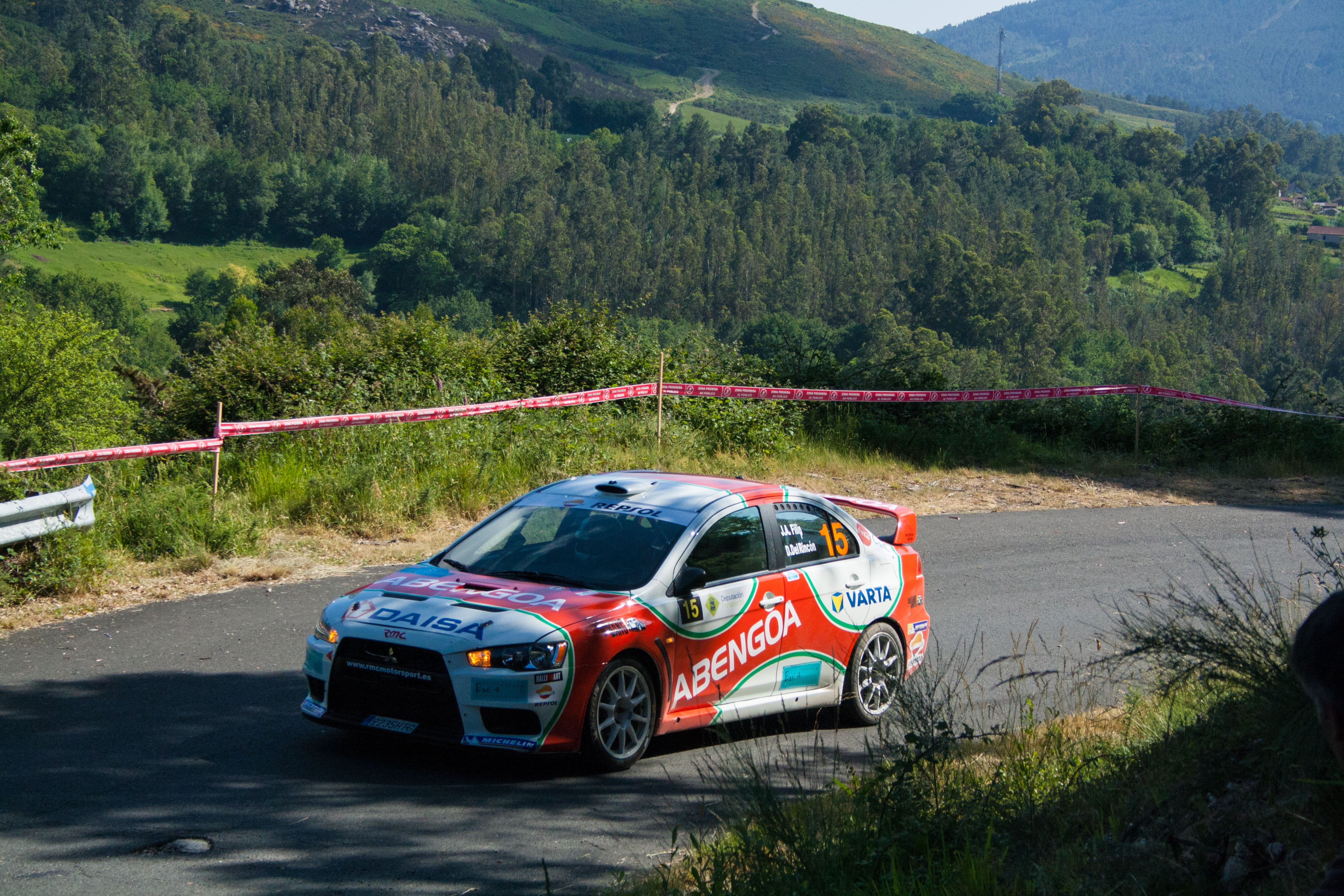 JUAN FILIP DANIEL DEL RINCON